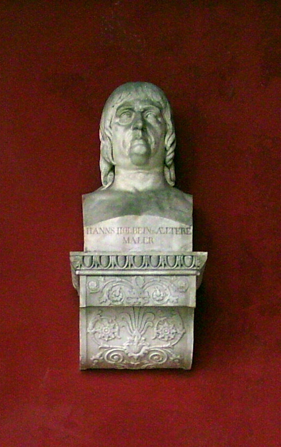 Bust of Hanns Holbein d.Aeltere at Ruhmeshalle ("Hall of fame"), München, Germany. Picture taken by myself: Dominik Hundhammer, München, 27 March 2006.